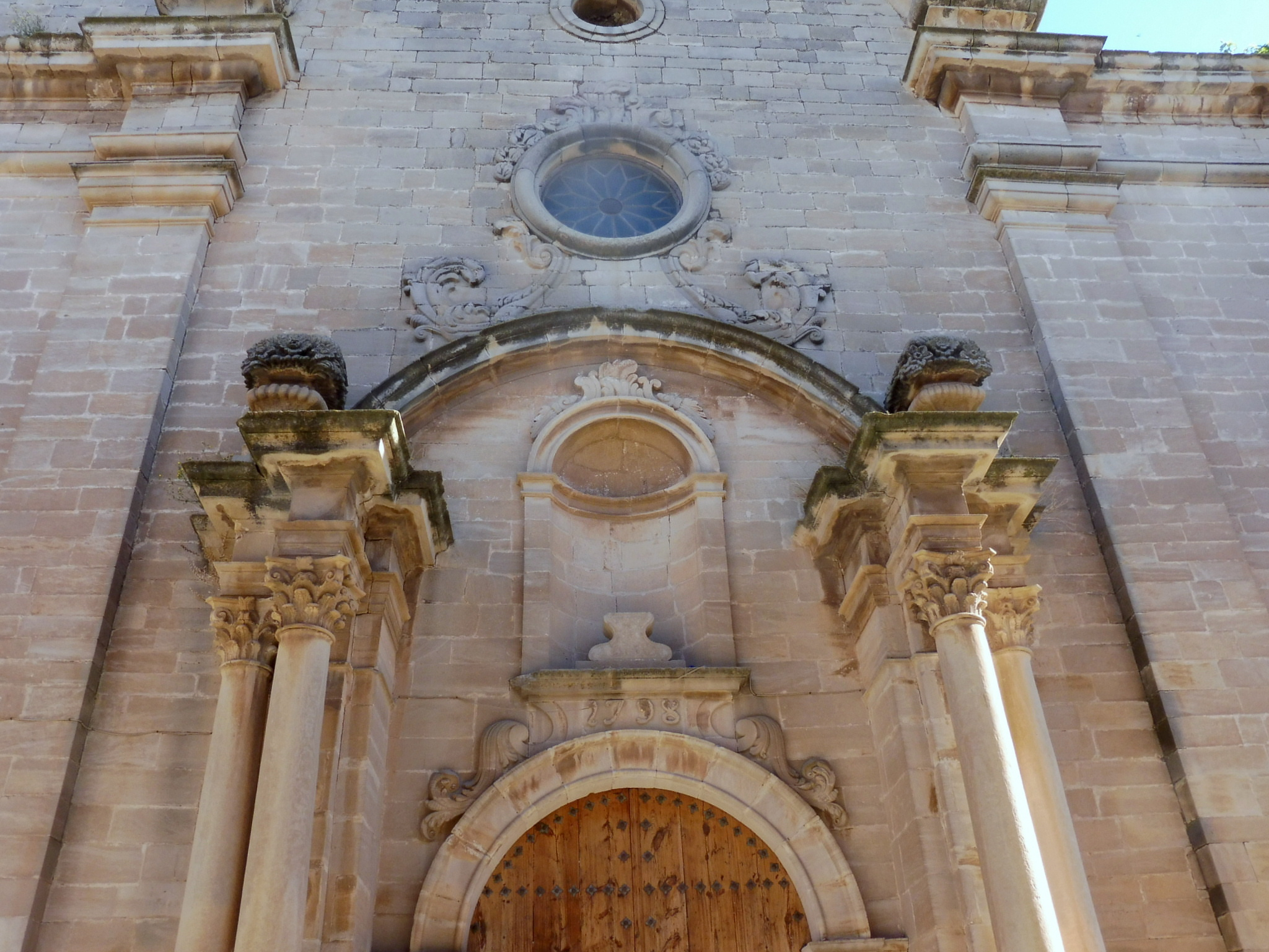 Església parroquial de l'Assumpció de Maldà: detall de la façana